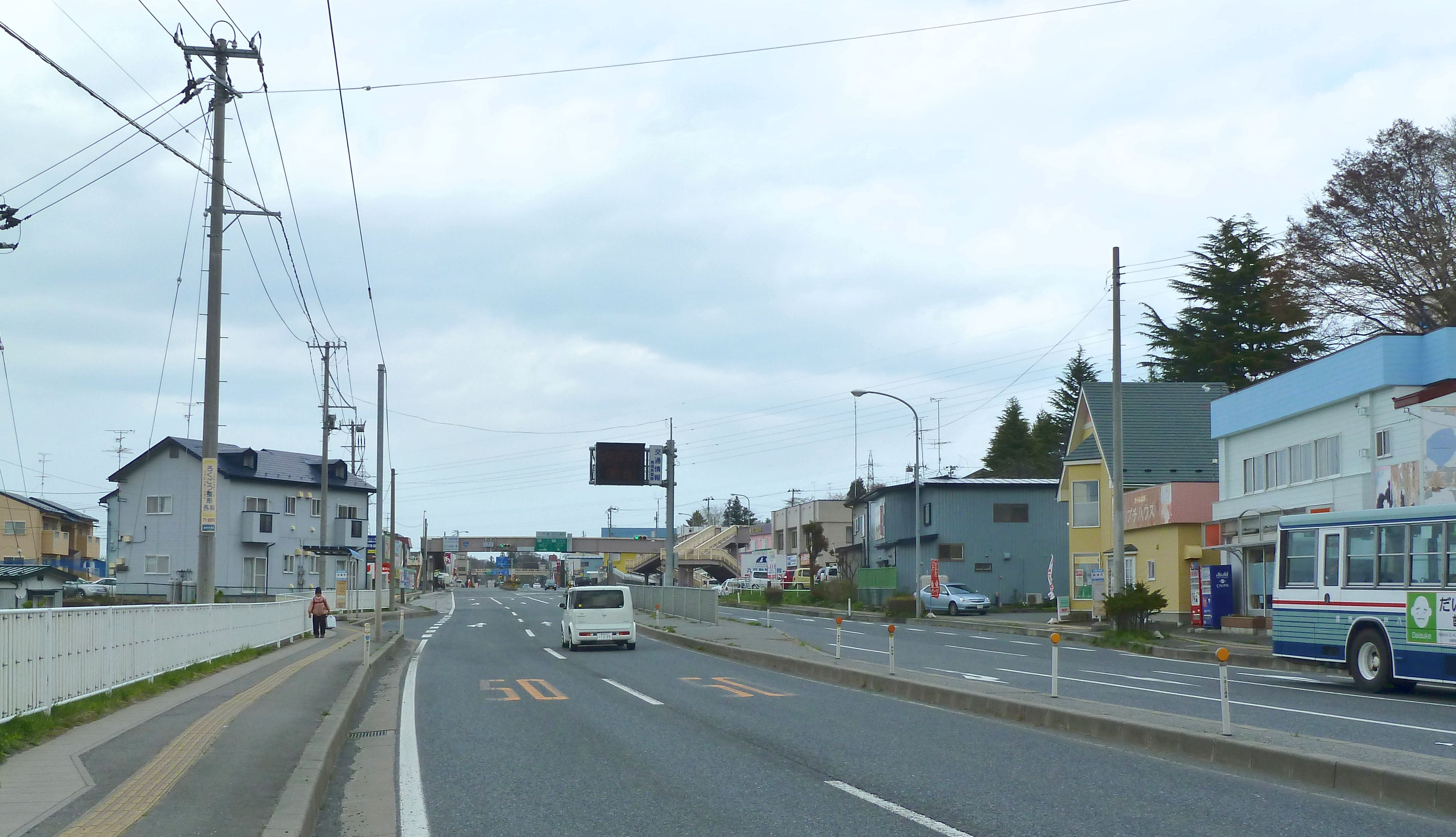 八戸市内を走る国道104号